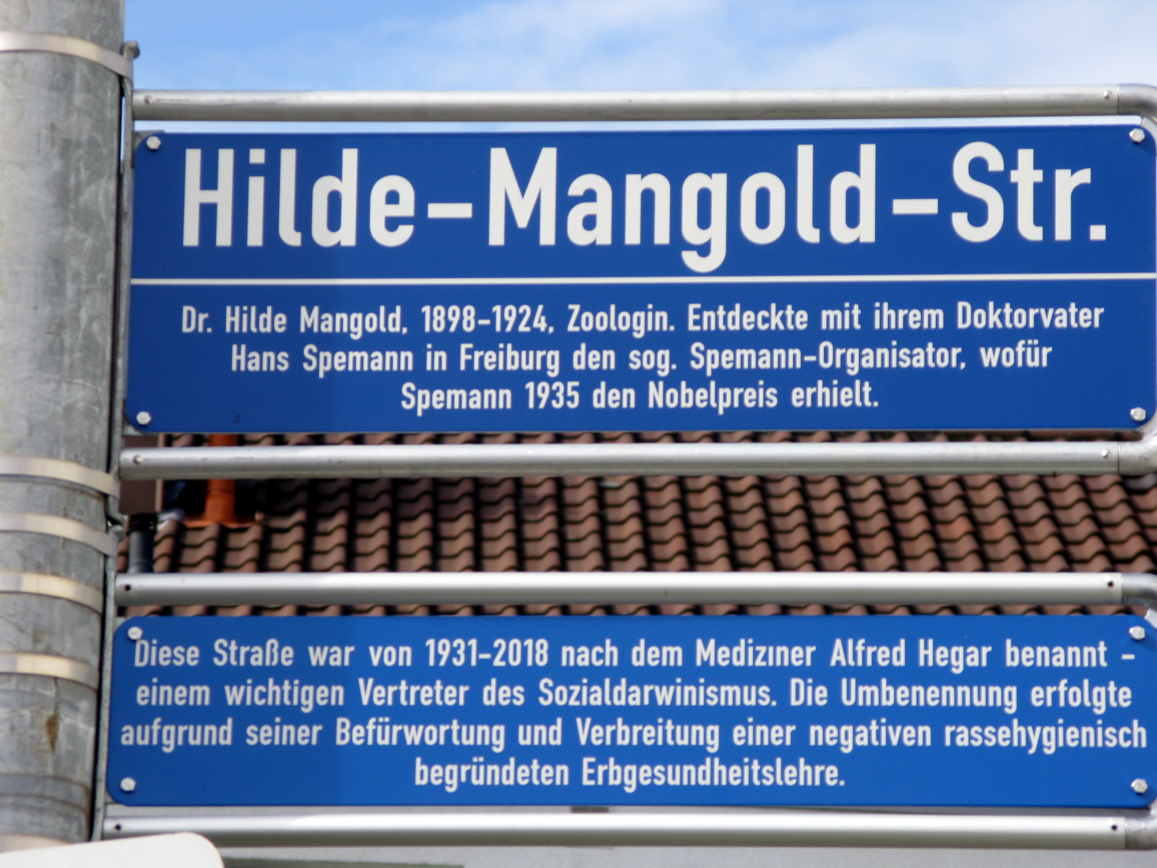 Hilde-Mangold-Straße in Freiburg-Stühlinger, bis 2018 Hegarstraße, Straßenschilder